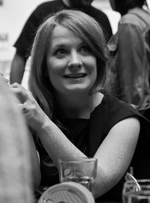 Měsíc autorského čtení 2014, 1.7.2014 v Brně